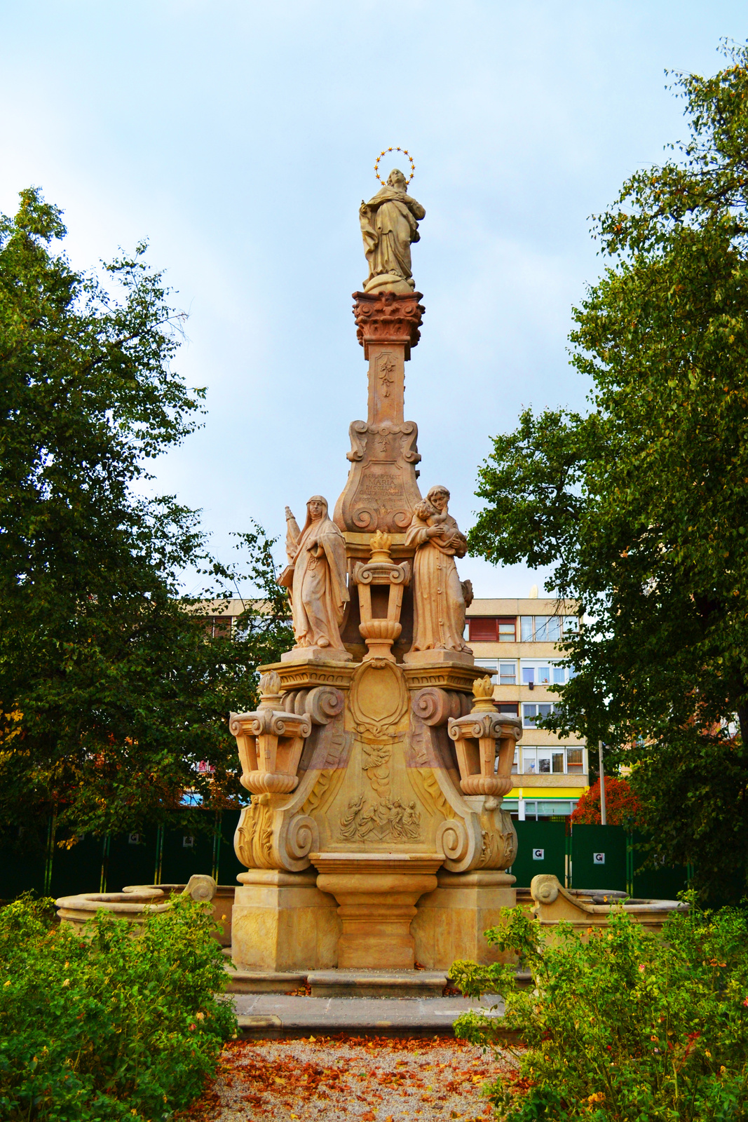 Mária-oszlop (Gödöllő, Szabadság tér) This is a photo of a monument in Hungary. Identifier: 7049